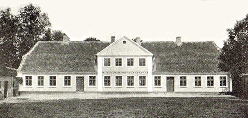 Pejrupgård er en gammel gård, som nævnes første gang i 1674. Gården ligger i Orte Sogn, Båg Herred, Odense Amt, Aarup Kommune. Hovedbygningen er opført i 1844